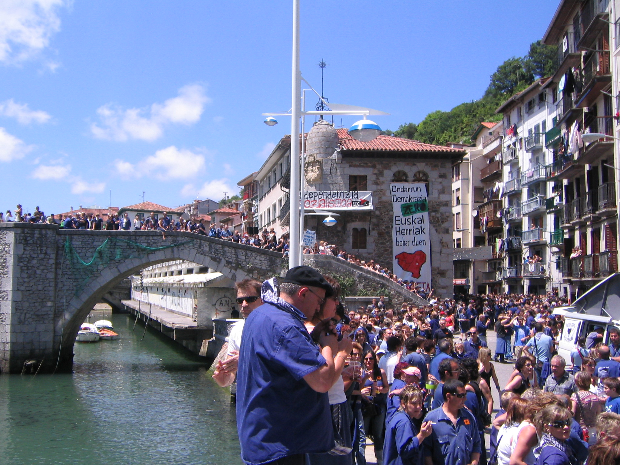 1 Celebración del Zapatu Azule en Ondarroa, se ve la cofradía vieja al fondo.